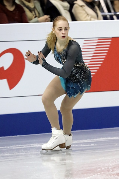 Дарья Паненкова (Россия) на финале юниорского Гран-при 2017-2018